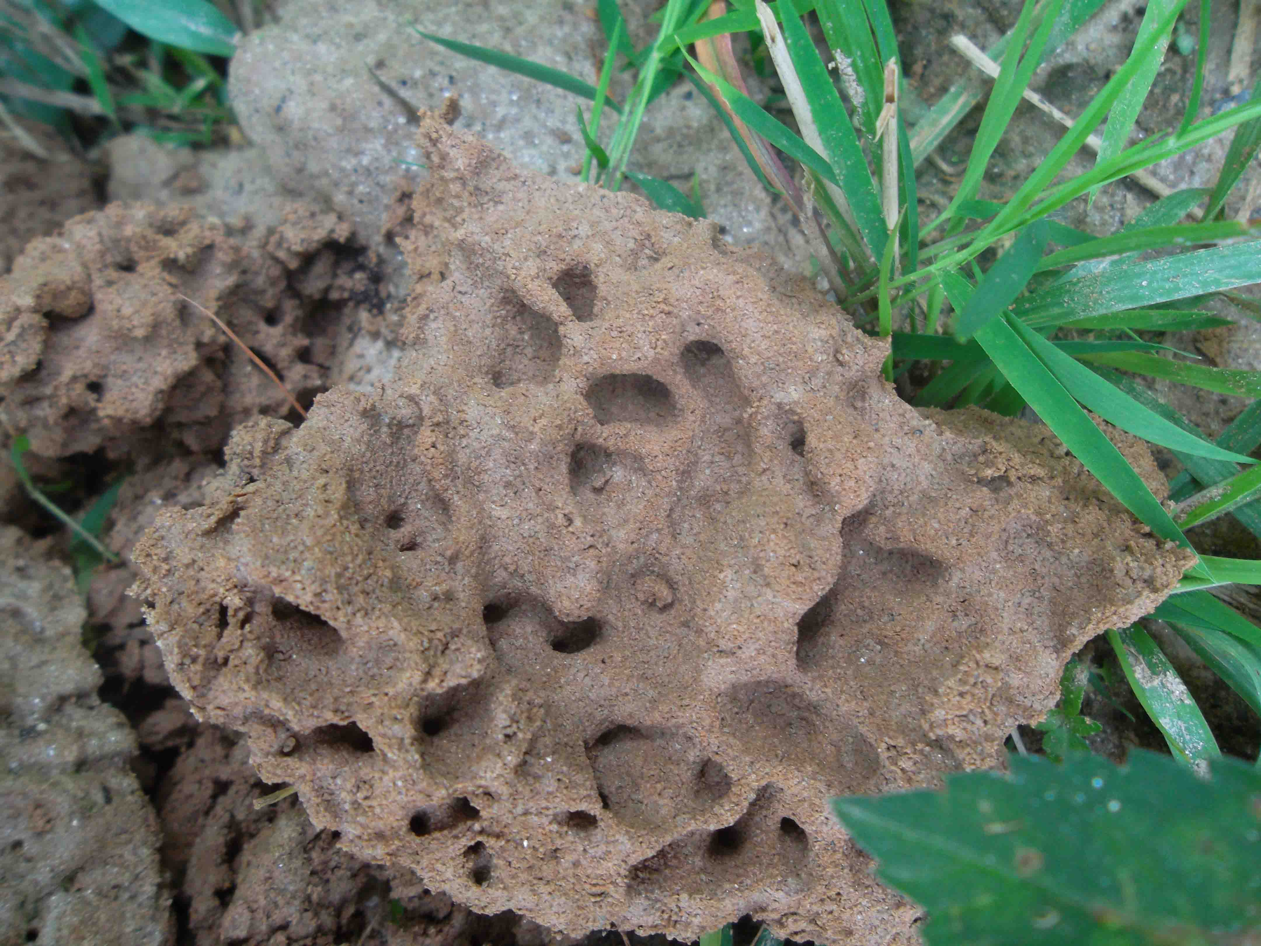 नेपाली: धमिराको गोलोको भित्री भाग